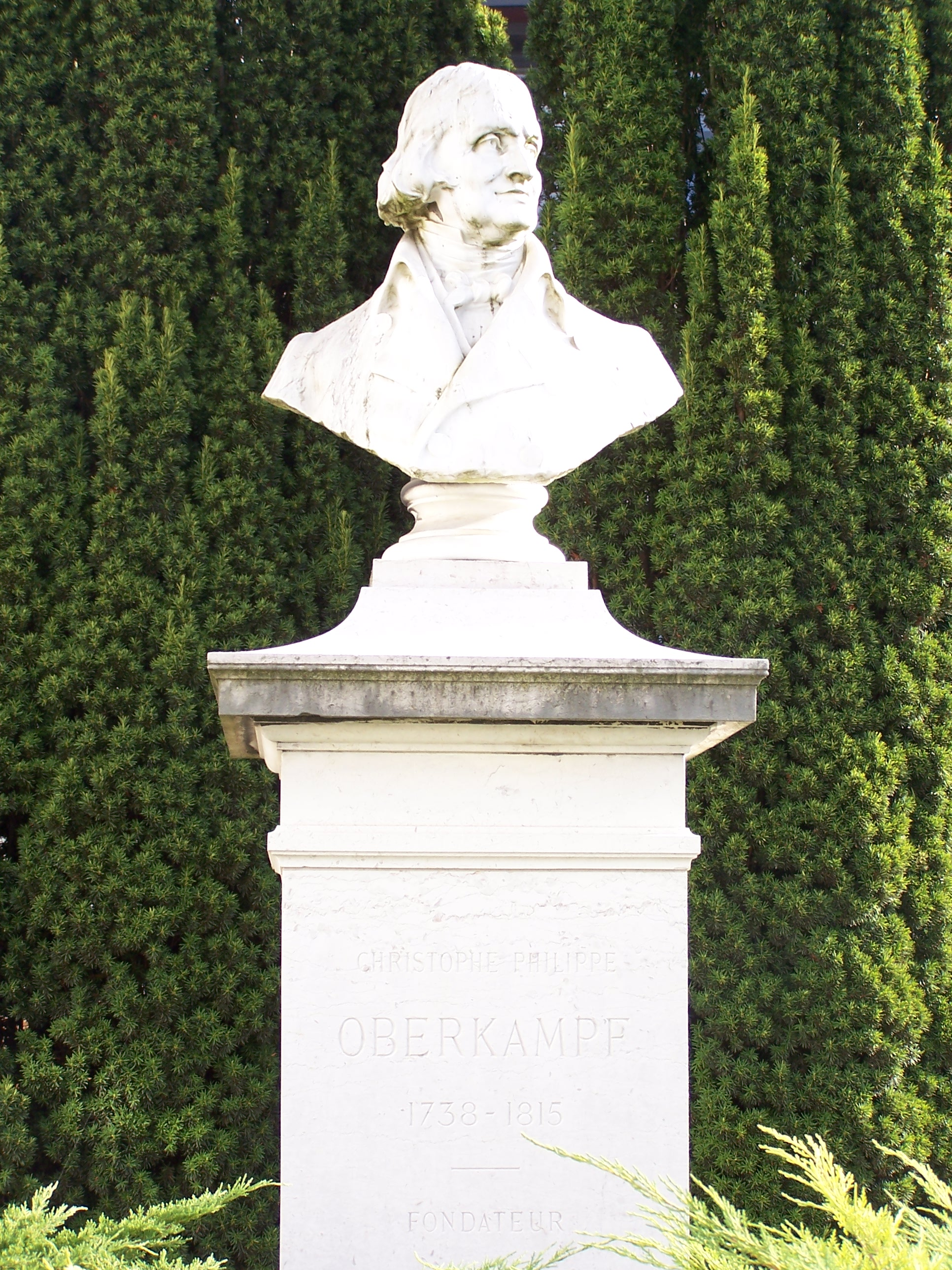 Buste d'Oberkampf à Jouy-en-Josas (Yvelines, France)